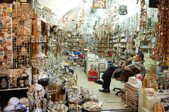 חנות בשוק הערבי